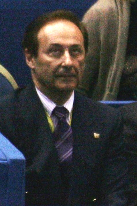 Слева на право: Дидье Гайаге (президент Французской федерацияи ледовых видов спорта), Оттавио Чинкванта (президент Международного союза конькобежцев) и Альбер II (князь Монако) на трибунах чемпионата мира по фигурному катанию 2012 (Ницца)